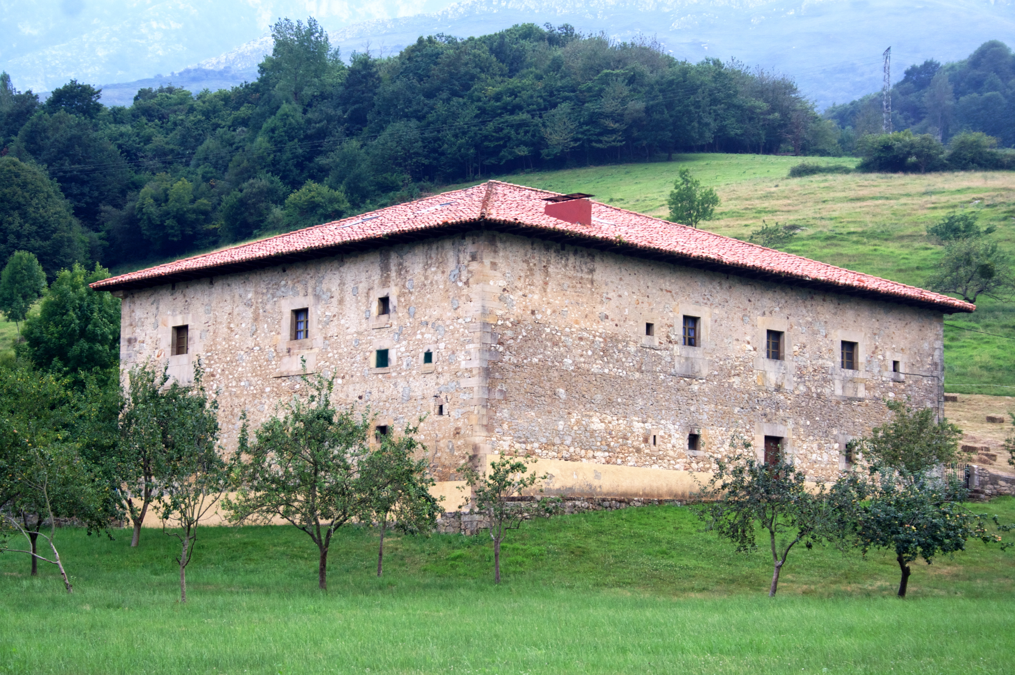 Cada de Cernuda, Poo de Cabrales, concejo de Cabrales. Asturias